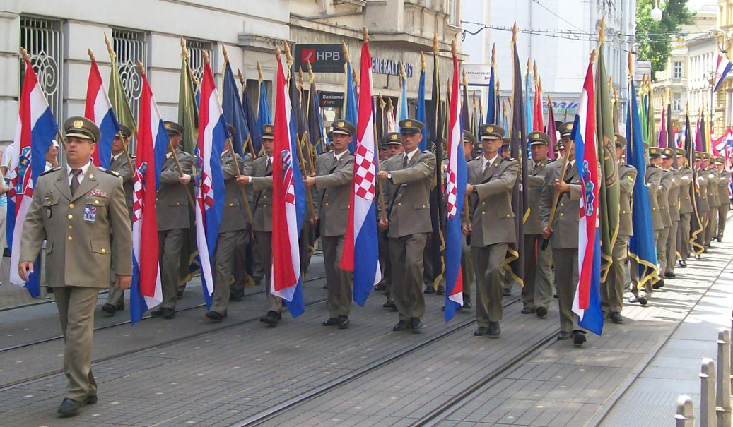 Ešalon ratnih zastava na proslavi Dana državnosti u Zagrebu 2008.